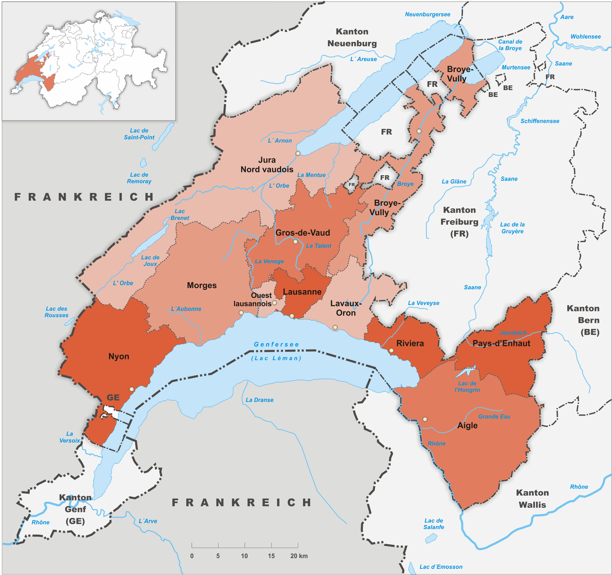 Bezirke des Kanton Waadt.